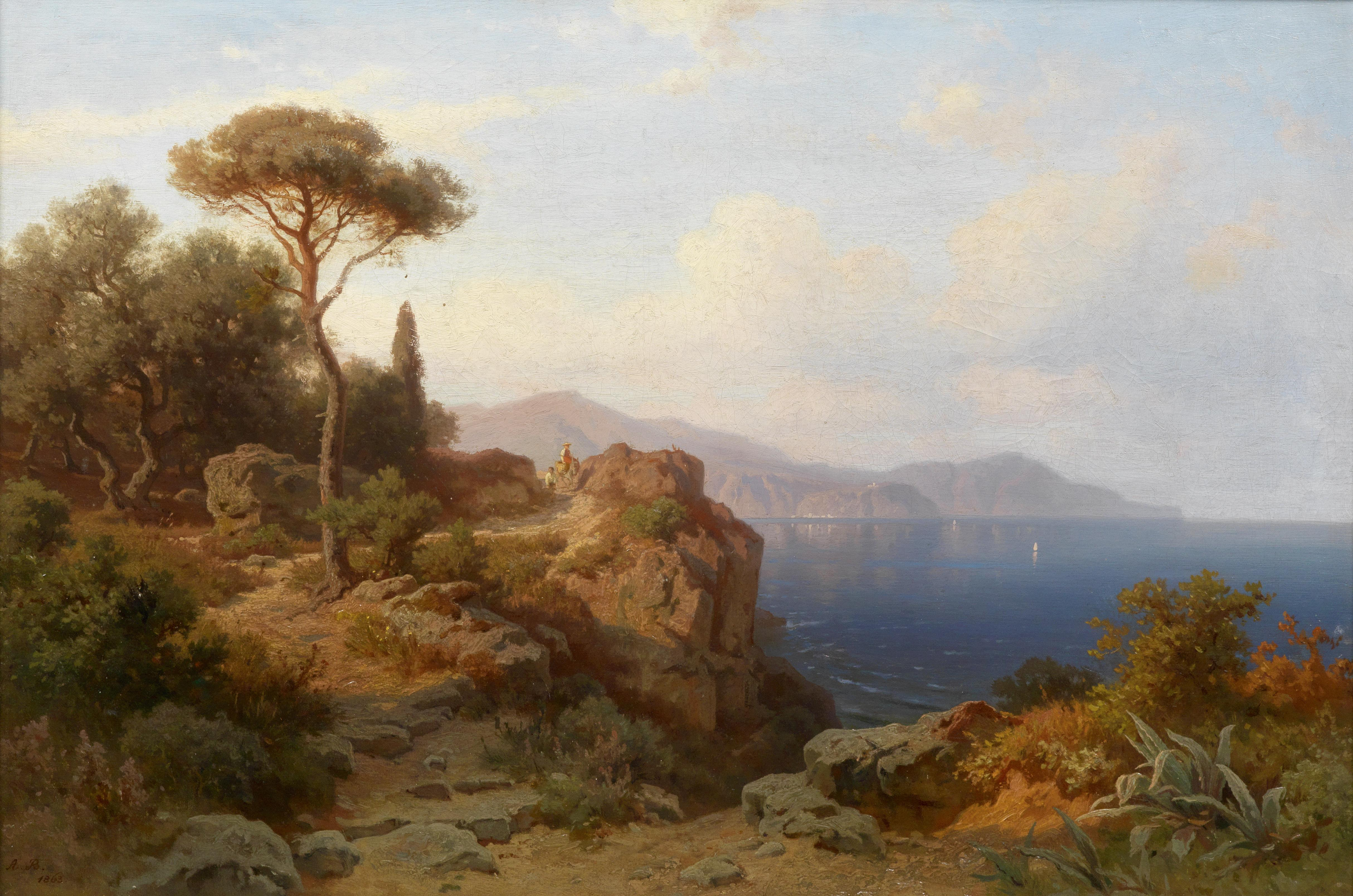 Küste bei Nizza, rückseitig betitelt und bezeichnet A. Behrendsen pxt. Nizza et Königsberg i. Pr. 1863, Öl auf Leinwand, 47 x 70,5 cm